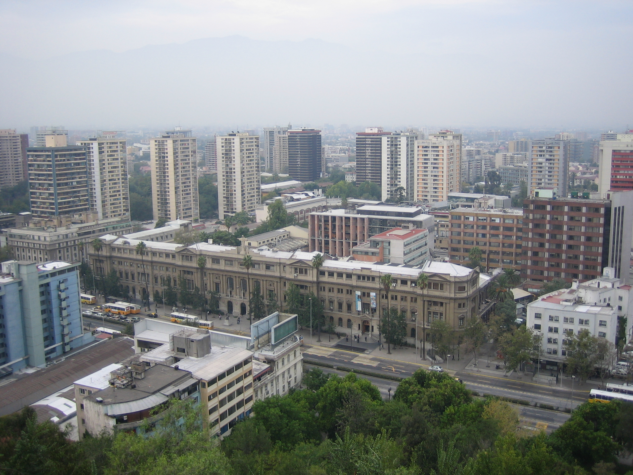 Von mir im März 2004 aufgenommen und unter public domain gestellt.